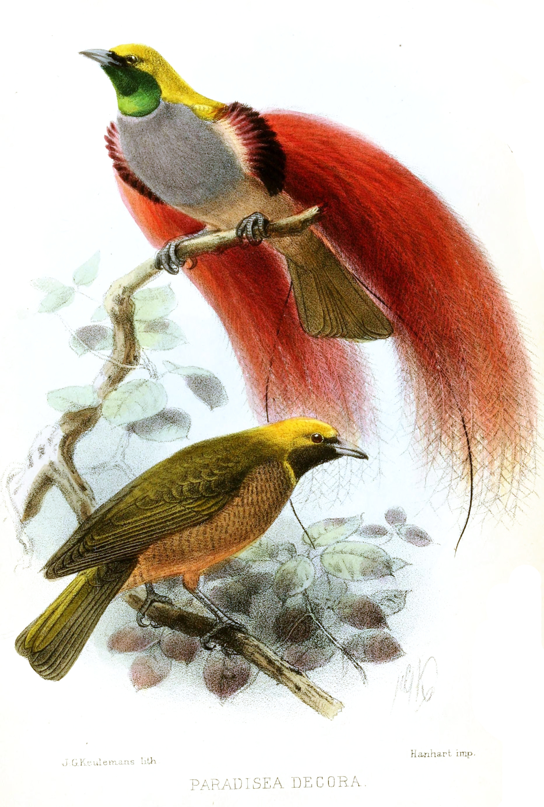 Paradisea decora = Paradisaea decora